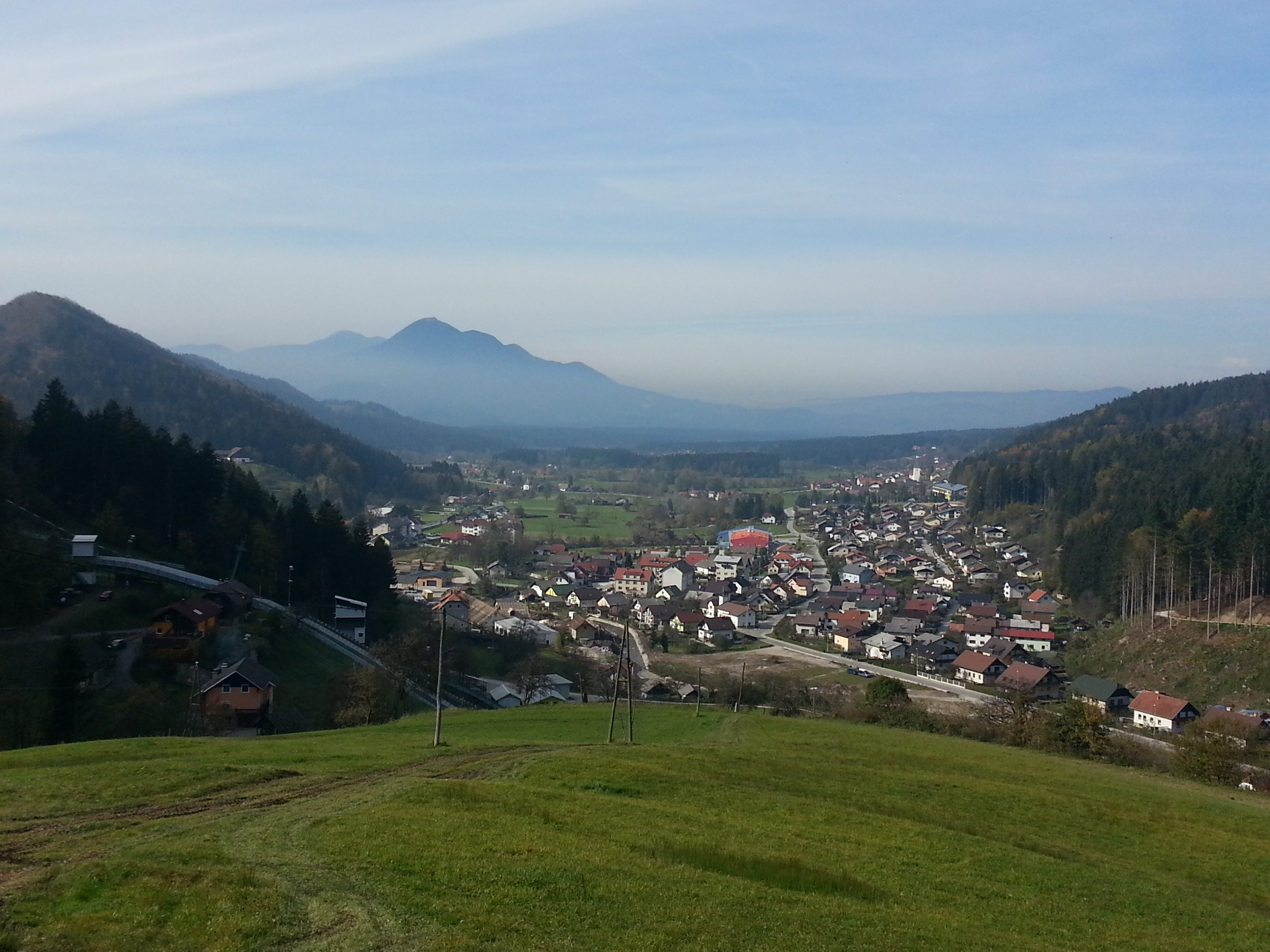 Mislinja